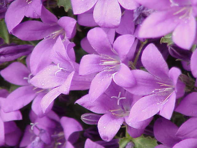 Species: Campanula portenschlagiana Family: Campanulaceae Image No. 1